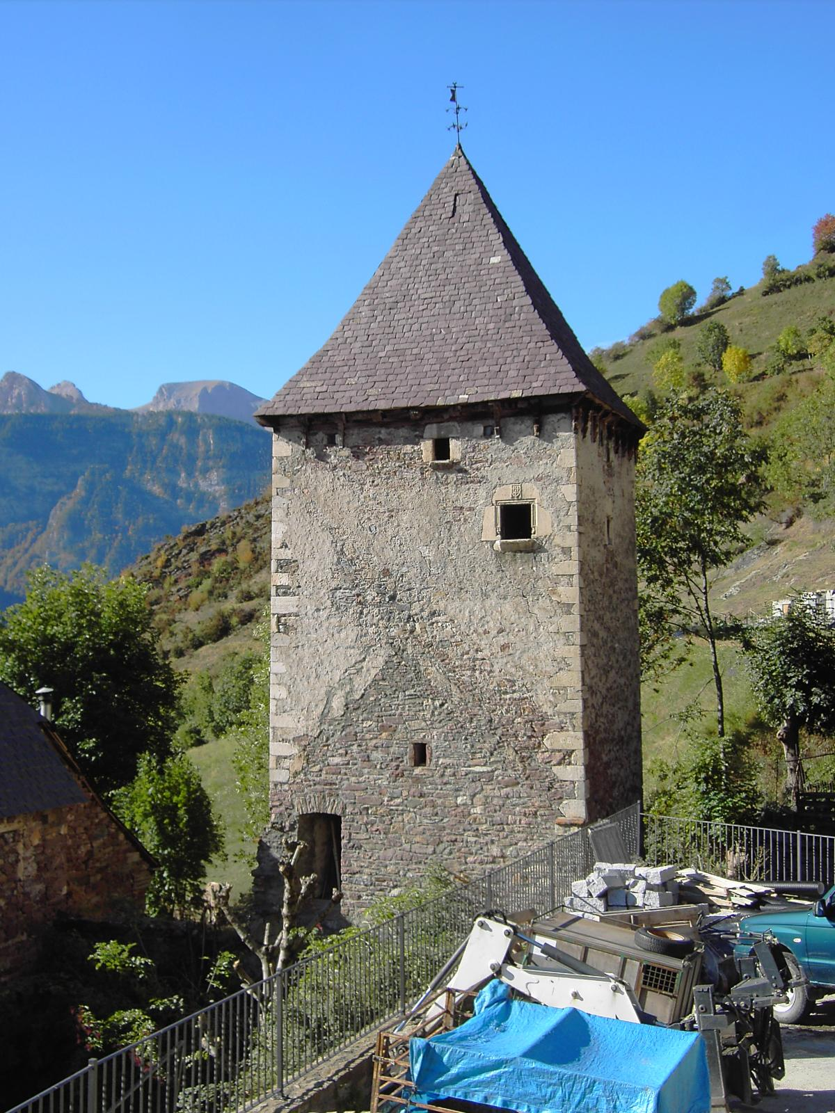 Torre señorial en Chistén conocida como la Torre de Rins, pues es patrimonio de dicha casa de la villa.